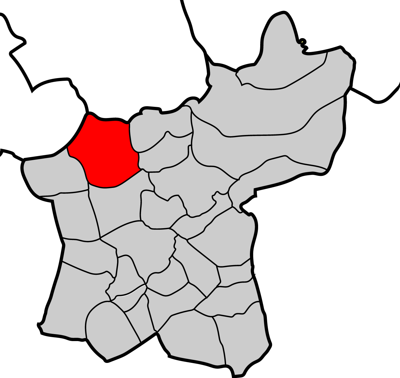 Mapa parroquia de Pacios Baralla